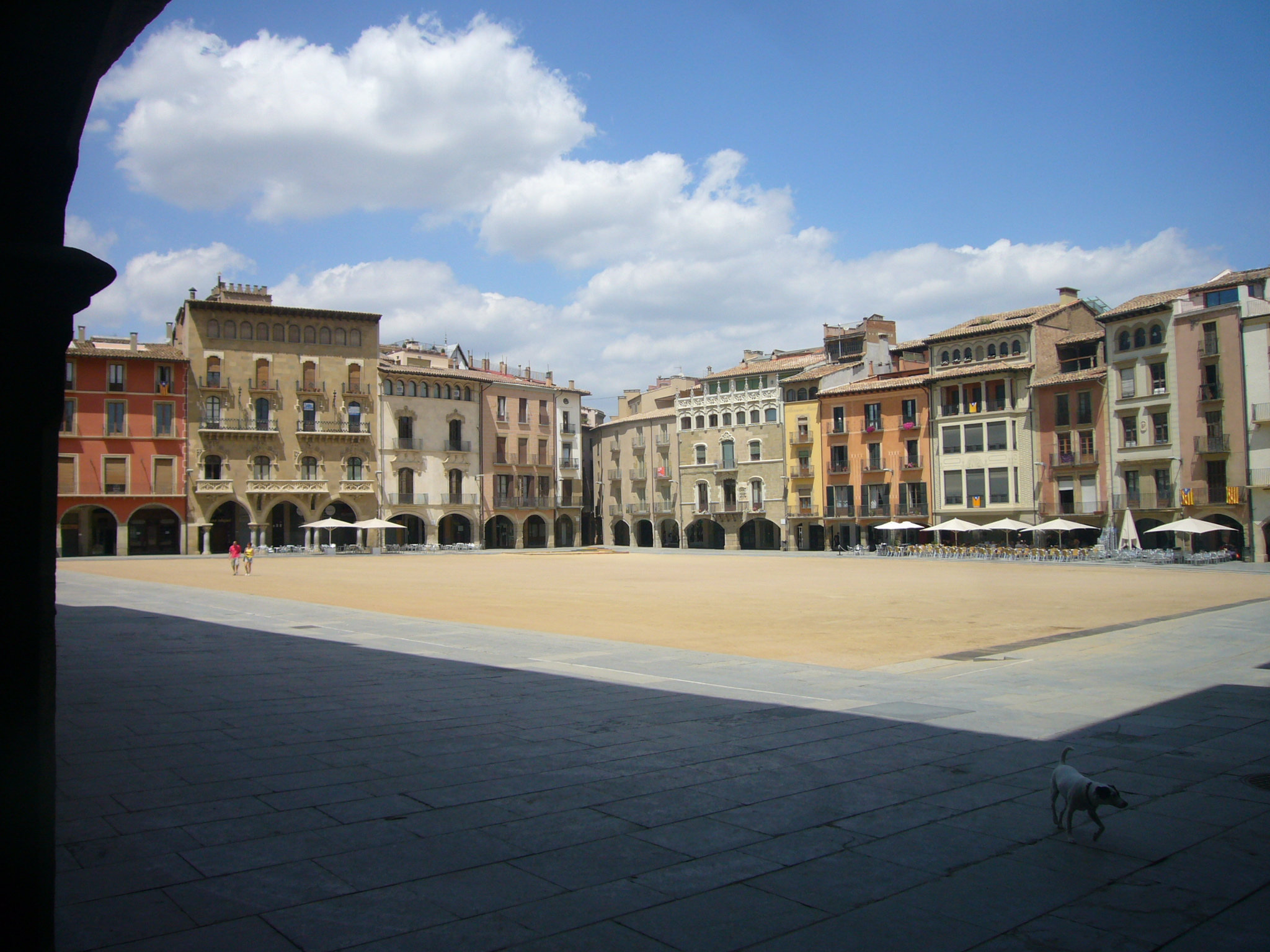 Vista de la plaça major de Vic